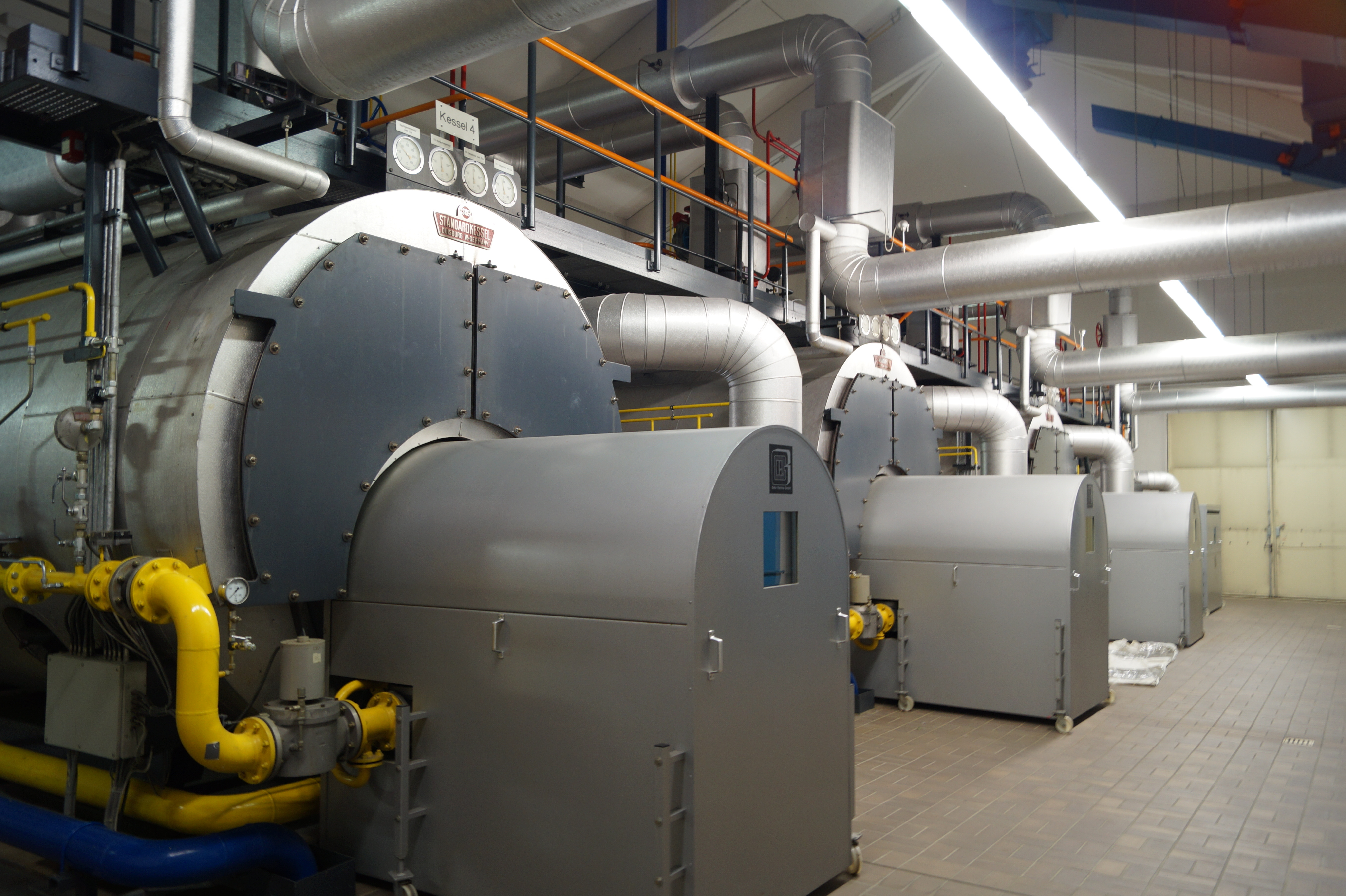 Blick in den Kesselraum des Heizwerkes Wolfgang (Stadtwerke Hanau GmbH) 2015.